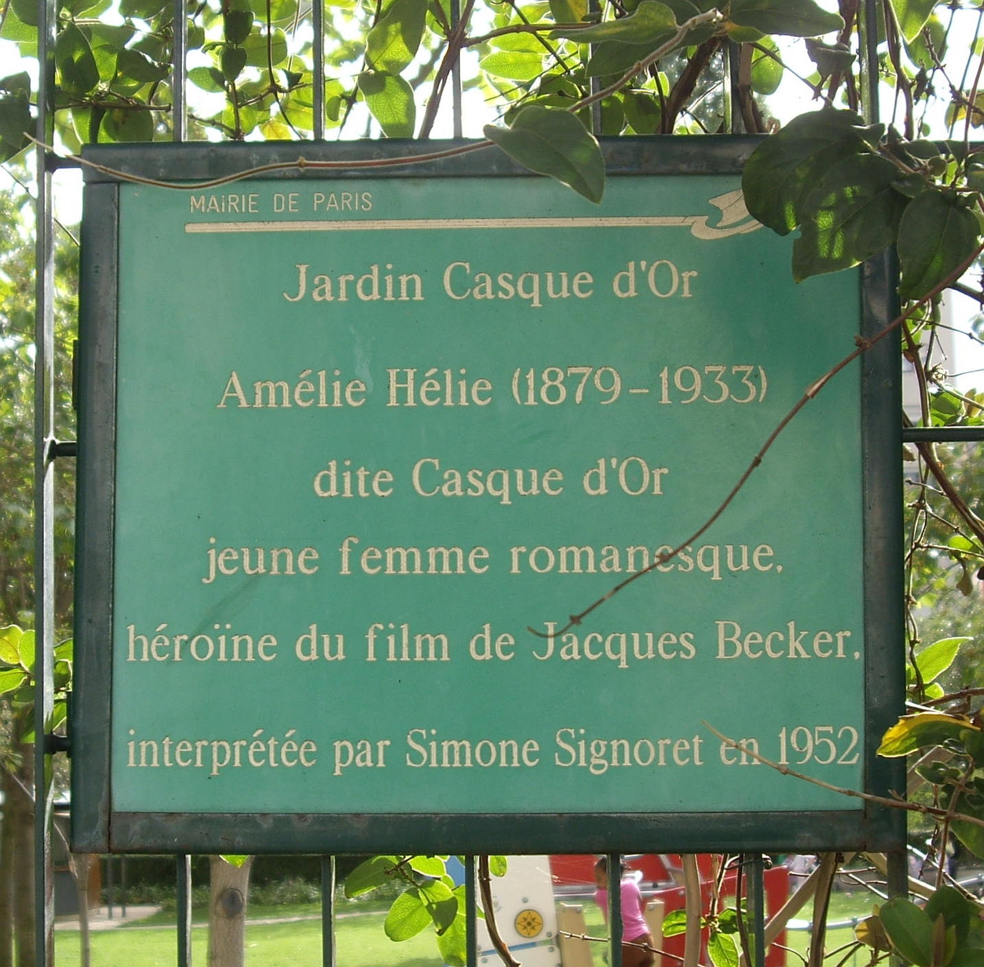 Panneau commémoratif au jardin Casque d'Or, Paris 20e. « Jardin Casque d'Or. Amélie Hélie (1879-1933), dite Casque d'Or, jeune femme romanesque, héroïne du film de Jacques Becker, interprétée par Simone Signoret en 1952. »